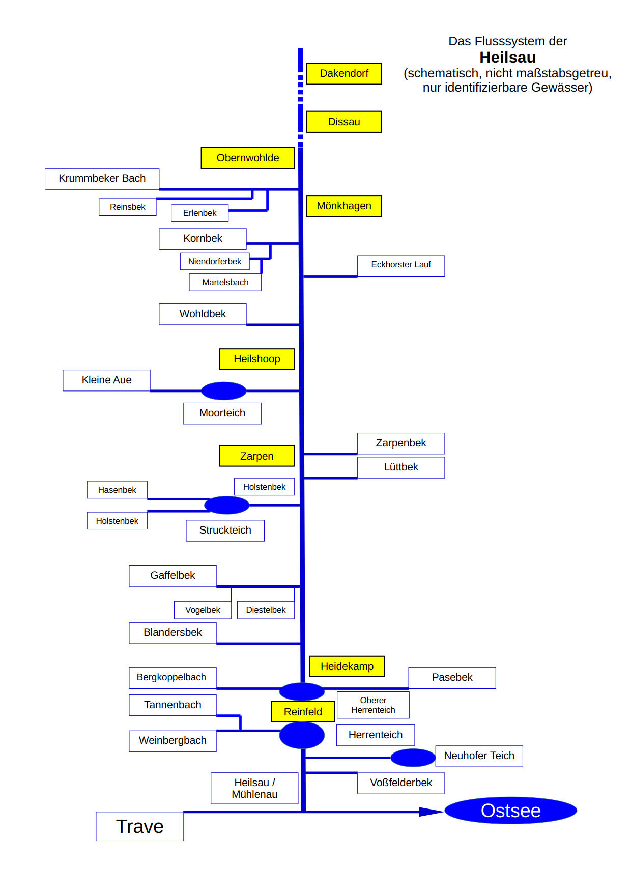 Heilsau / Schematische Darstellung des Flusssystemes